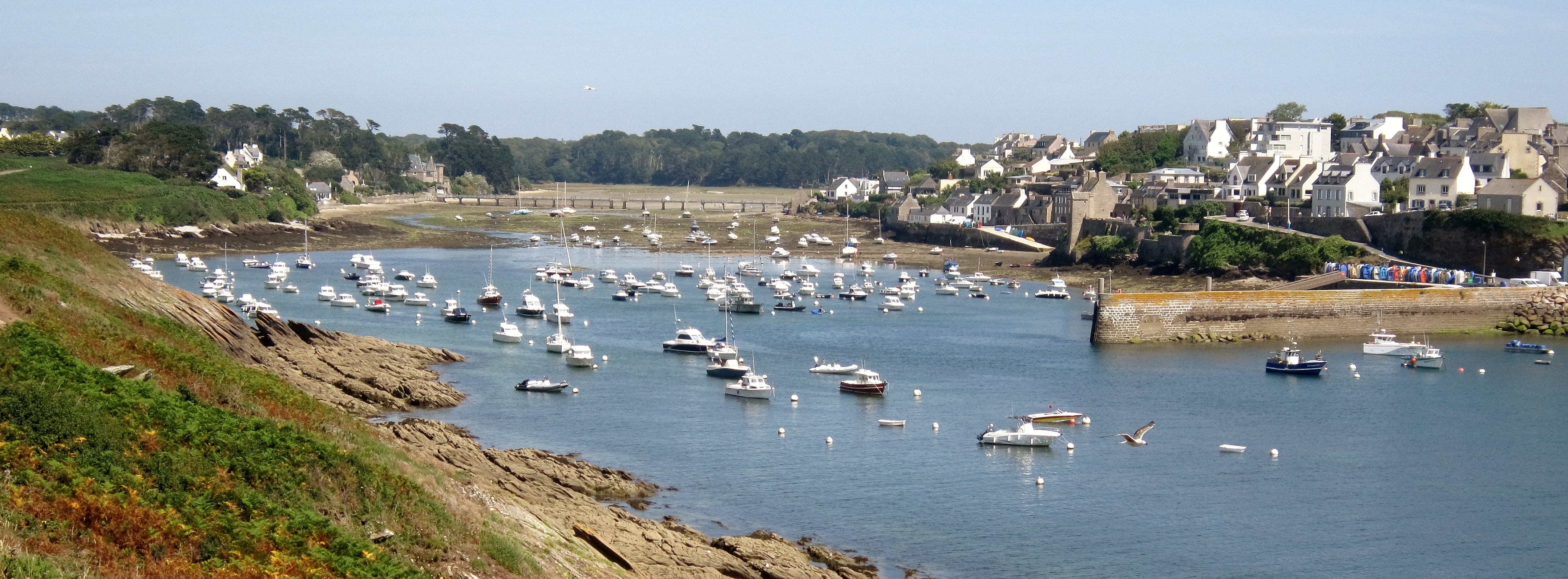 La ria du Conquet à marée basse vue depuis la presqu'île de Kermorvan ; on distingue au centre de la photographie la passerelle du Croaë et, à l'arrière-plan, la presqu'île de Kerjan-Mol.